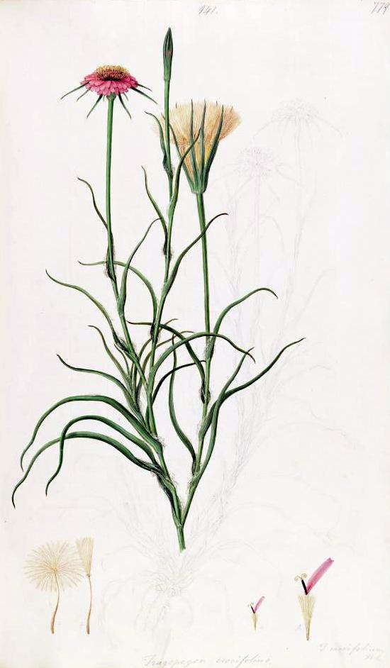 Tragopogon crocifolius - en Sibthrop, J. & Smith, J.E., Flora Graeca, vol. 8:, t. 79, 1833